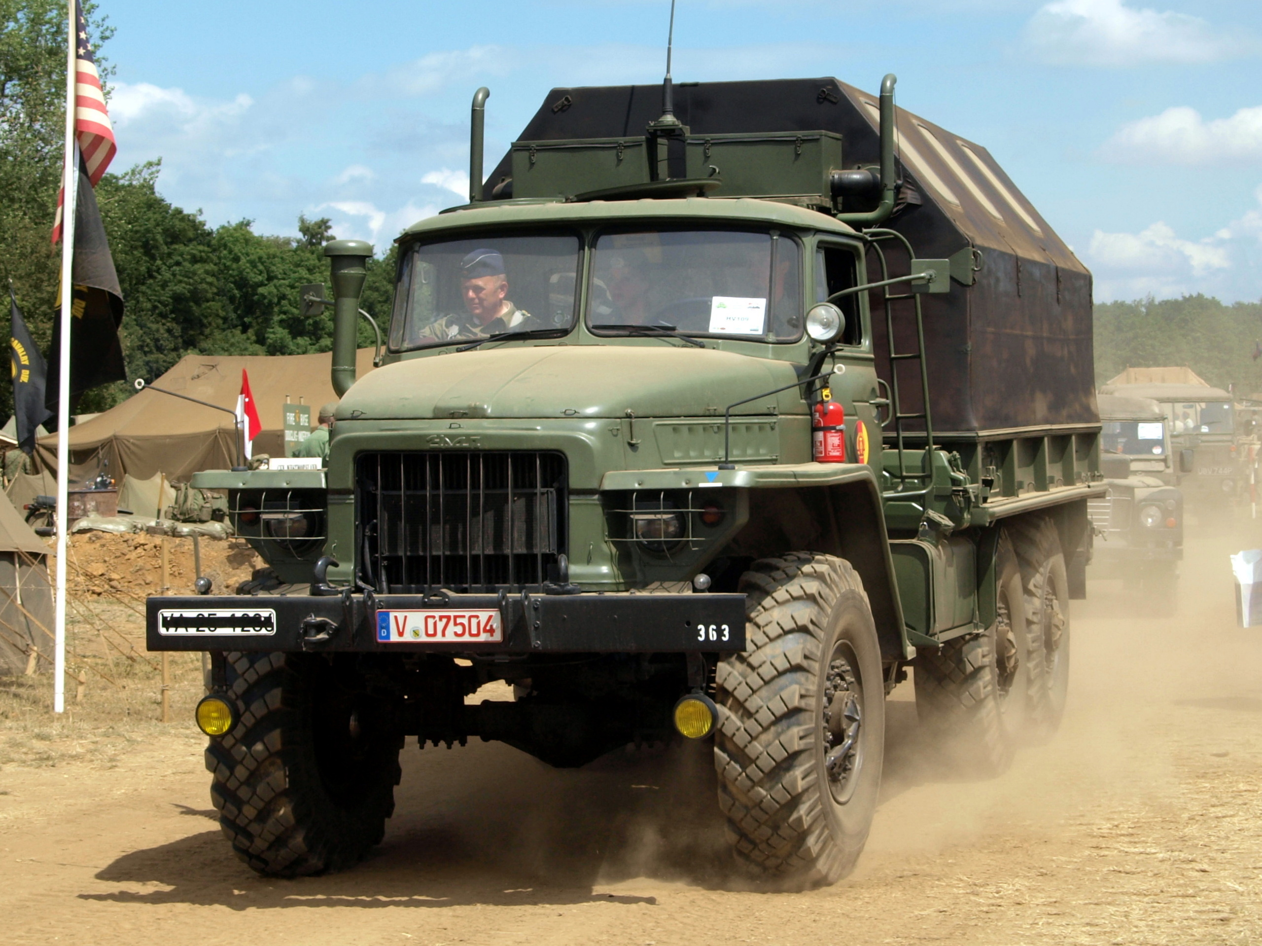 URAL-375D